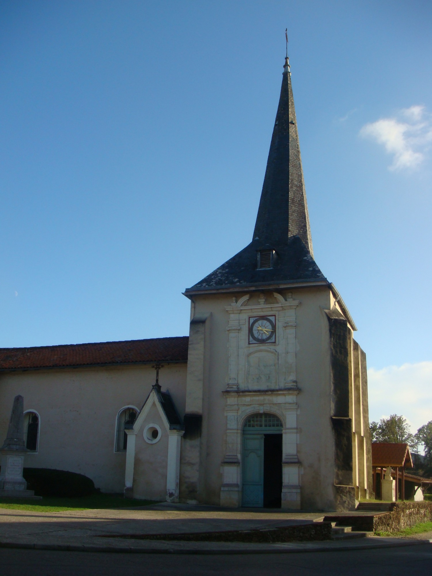 L'église Saint-Martin de Lévignacq (Landes) conserve notamment un ensemble de fresques du 15ème siècle.